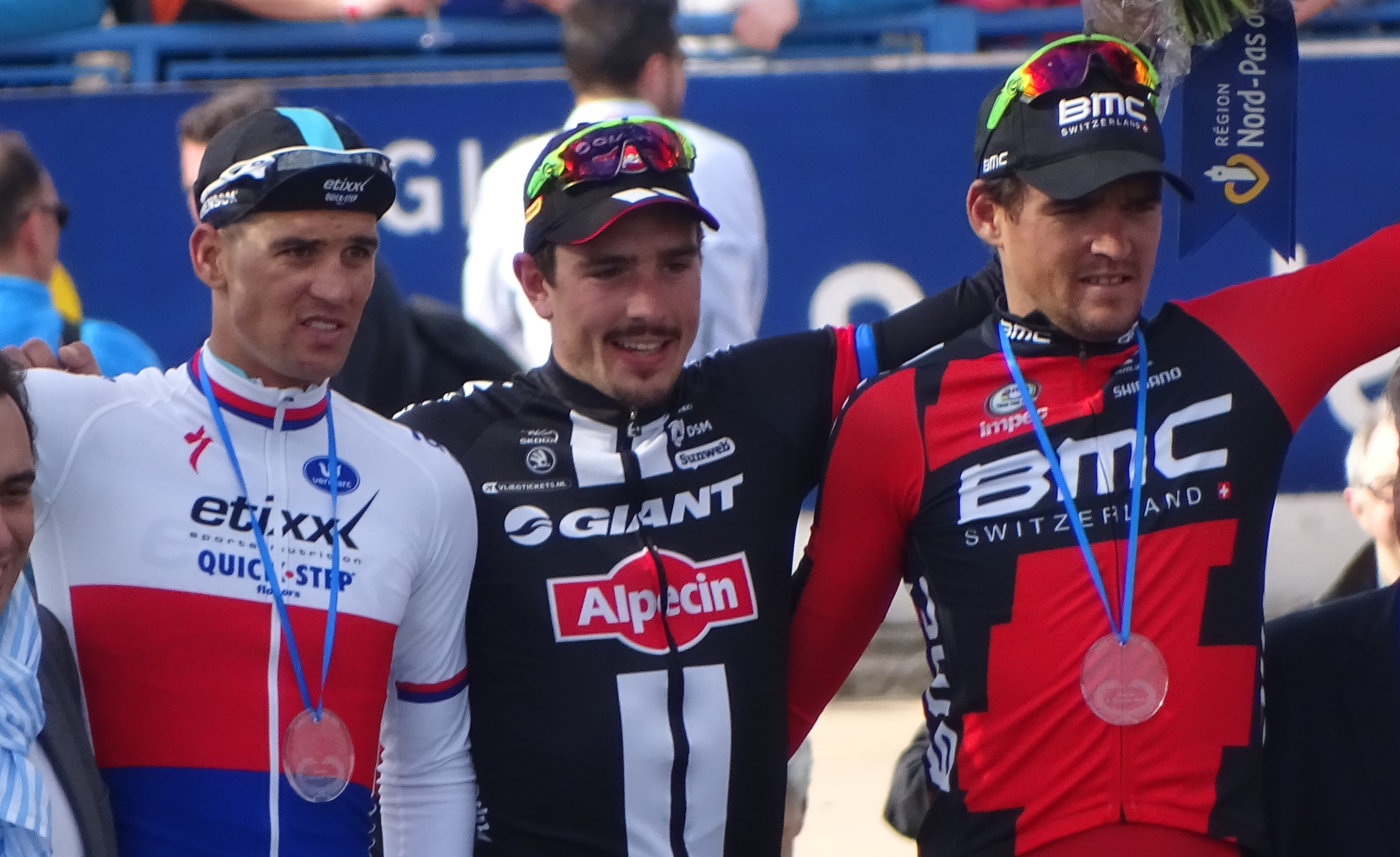 Reportage réalisé le dimanche 12 avril à l'occasion de l'arrivée du Paris-Roubaix 2015 à Roubaix, France.